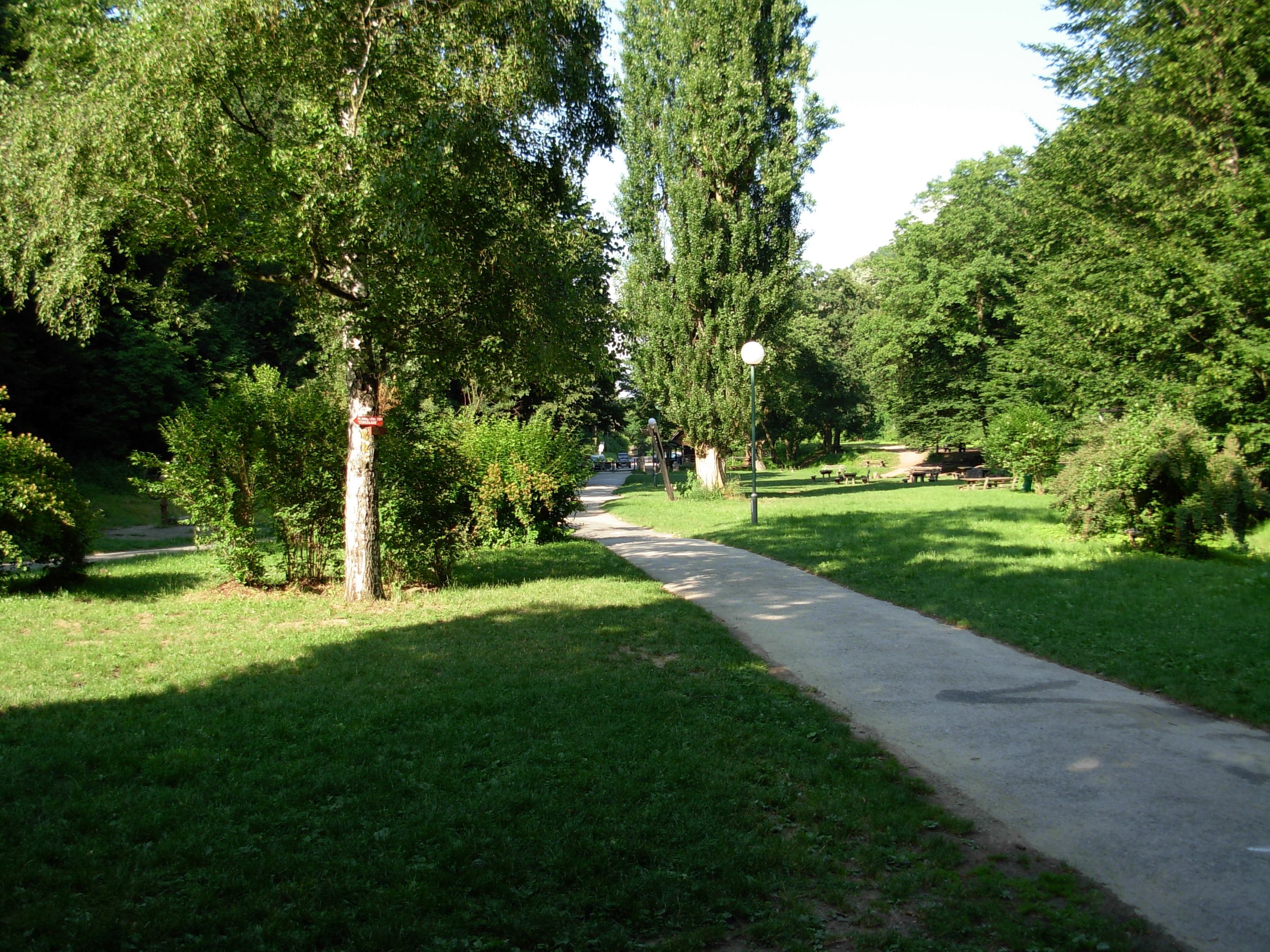 Stražilovo u leto 2008. godine